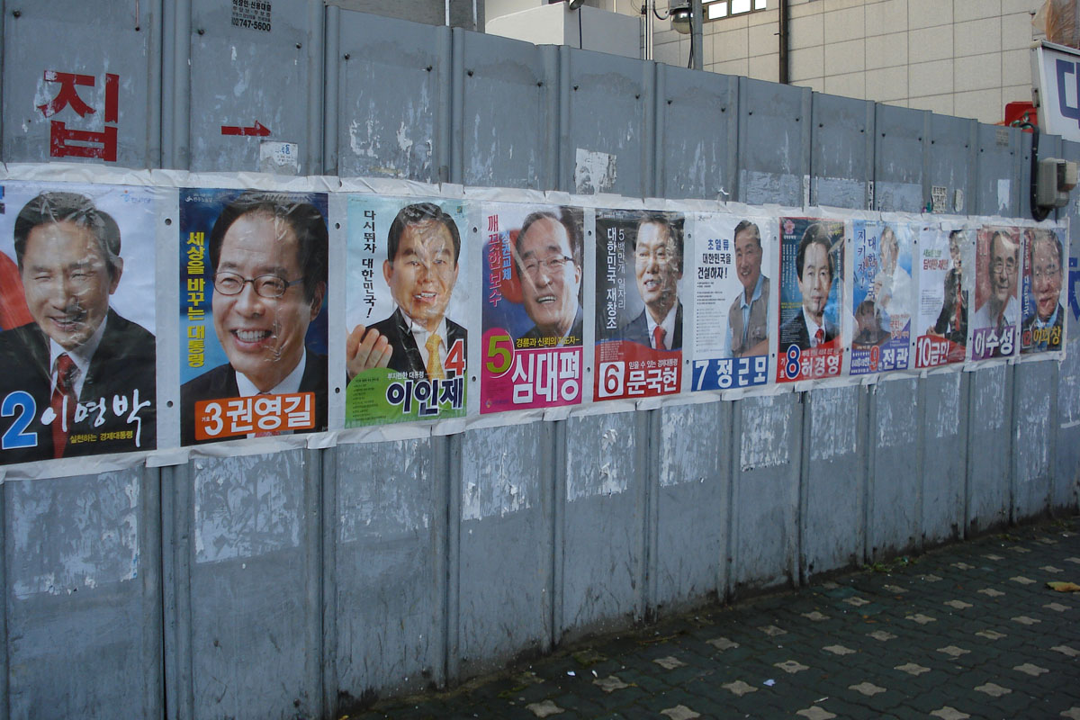 2007 korea Presidential Election